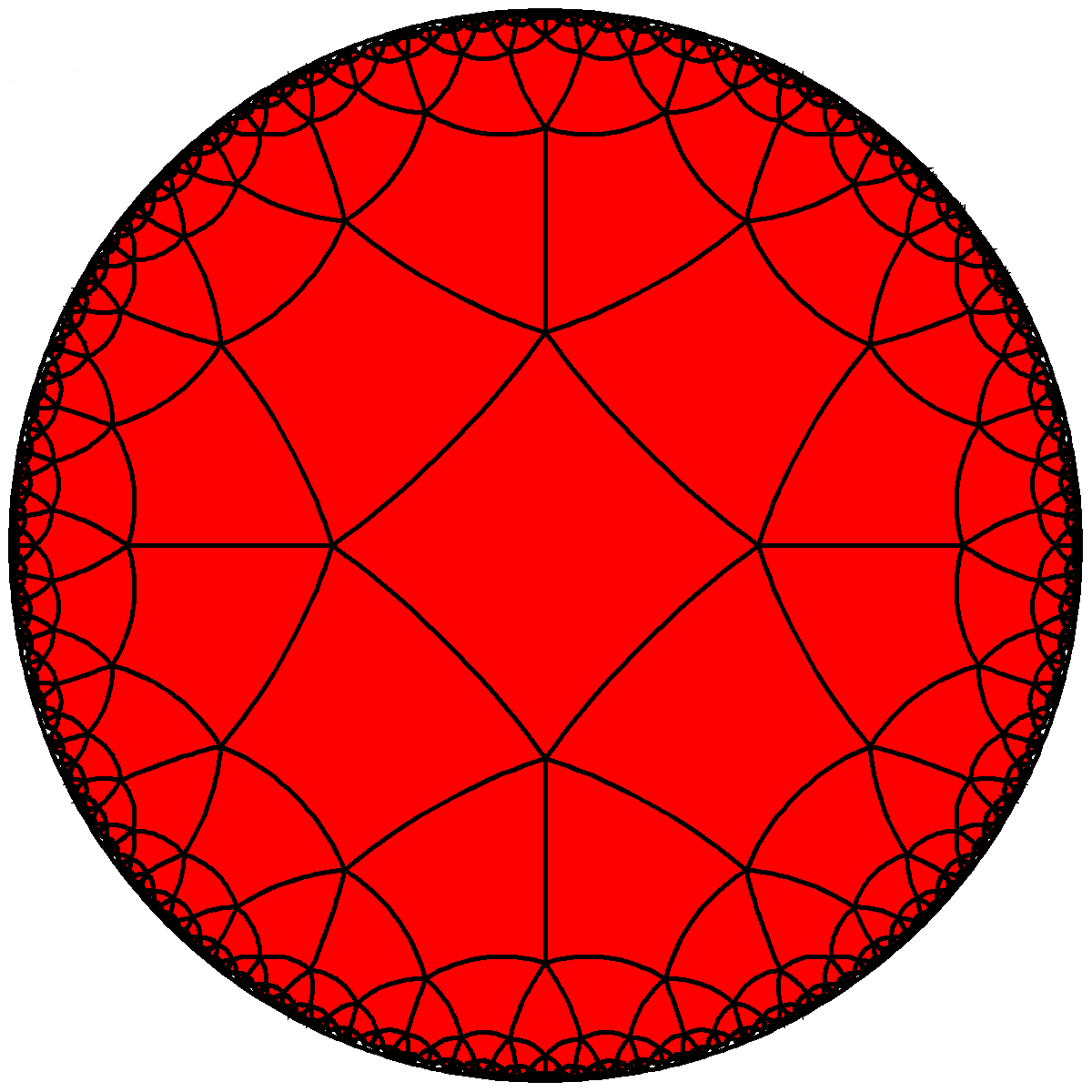 Quadrillage du disque de Poincaré